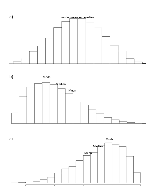 مکان نسبی سنجش های گرایش به مرکز a) توزیع نرمال b) (توزیع چوله مثبت (راست c)(توزیع چوله منفی (چپ